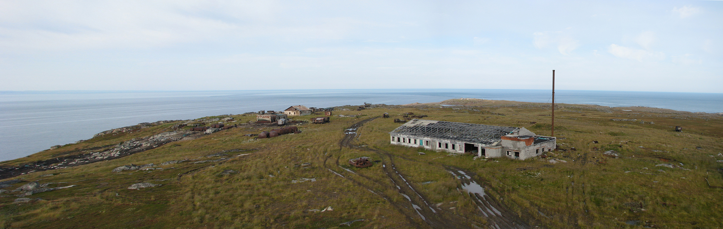 Вид_с_маяка_на_Белое_и_Баренцево_море